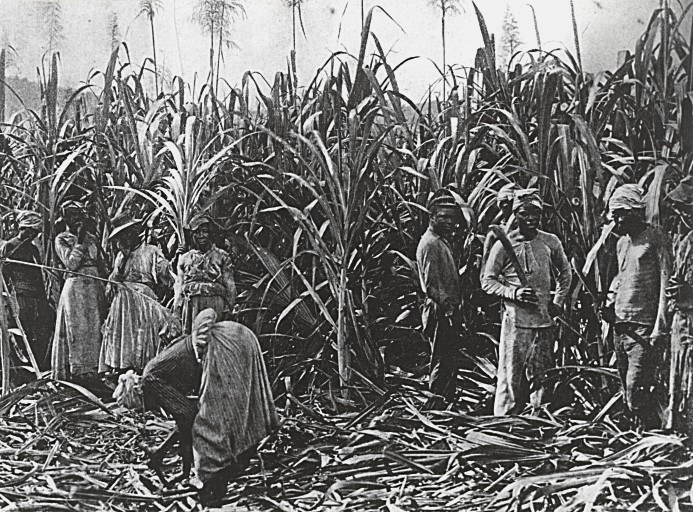 Cannes à sucre — Réunion